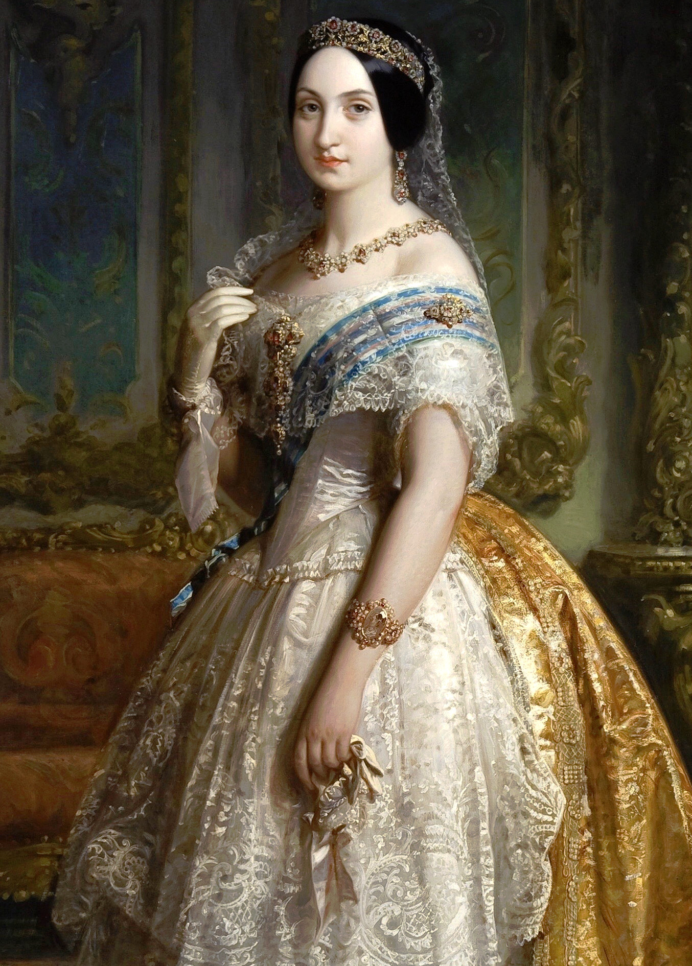 Retrato de la infanta Luisa Fernanda de Borbón (1832-1897), que fue hija del rey Fernando VII de España y hermana de la reina Isabel II.